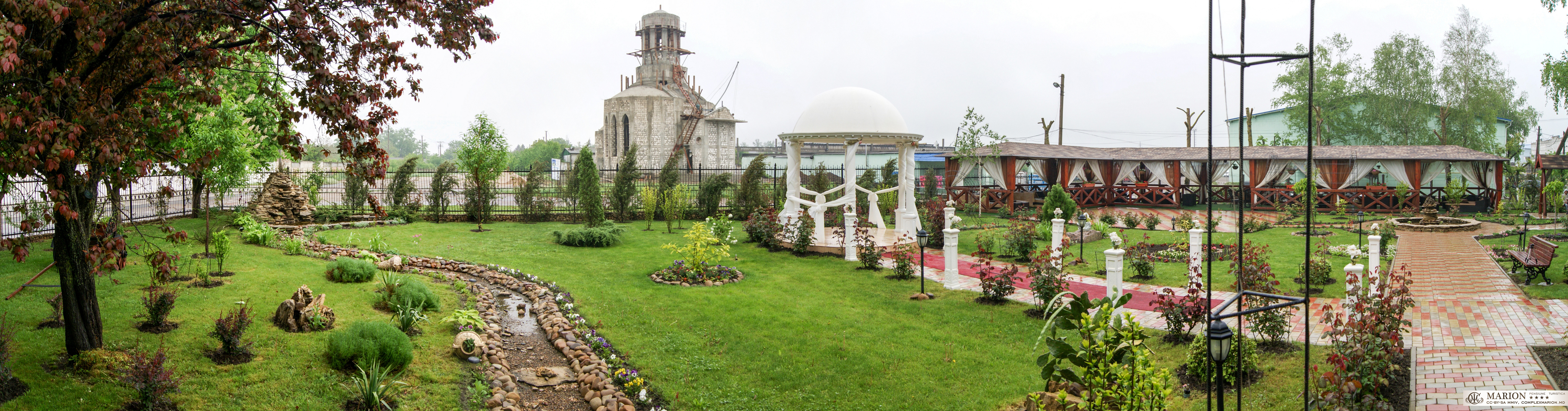 MARION 4* - Garden